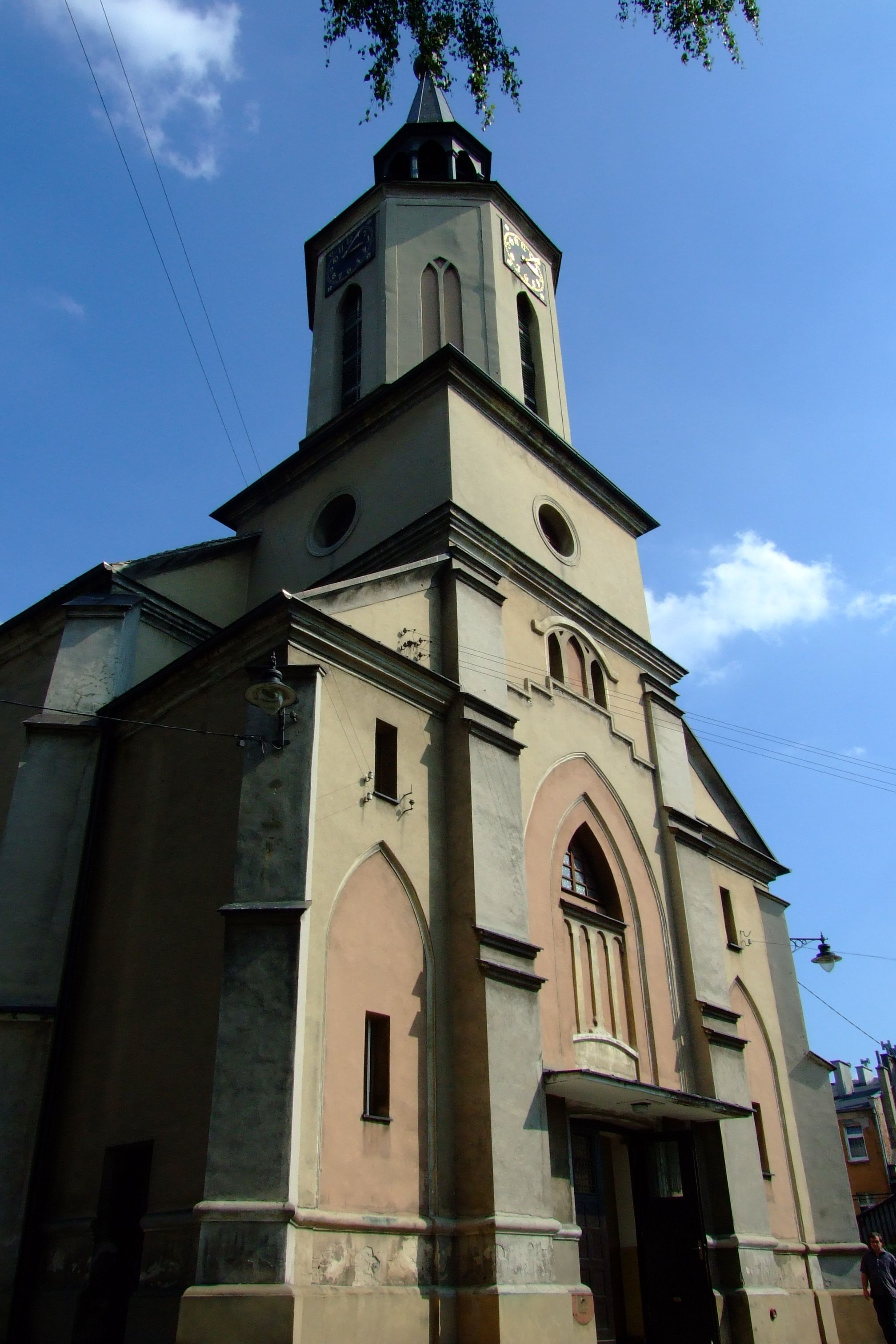 Kościół św. Mikołaja w Pyskowicach